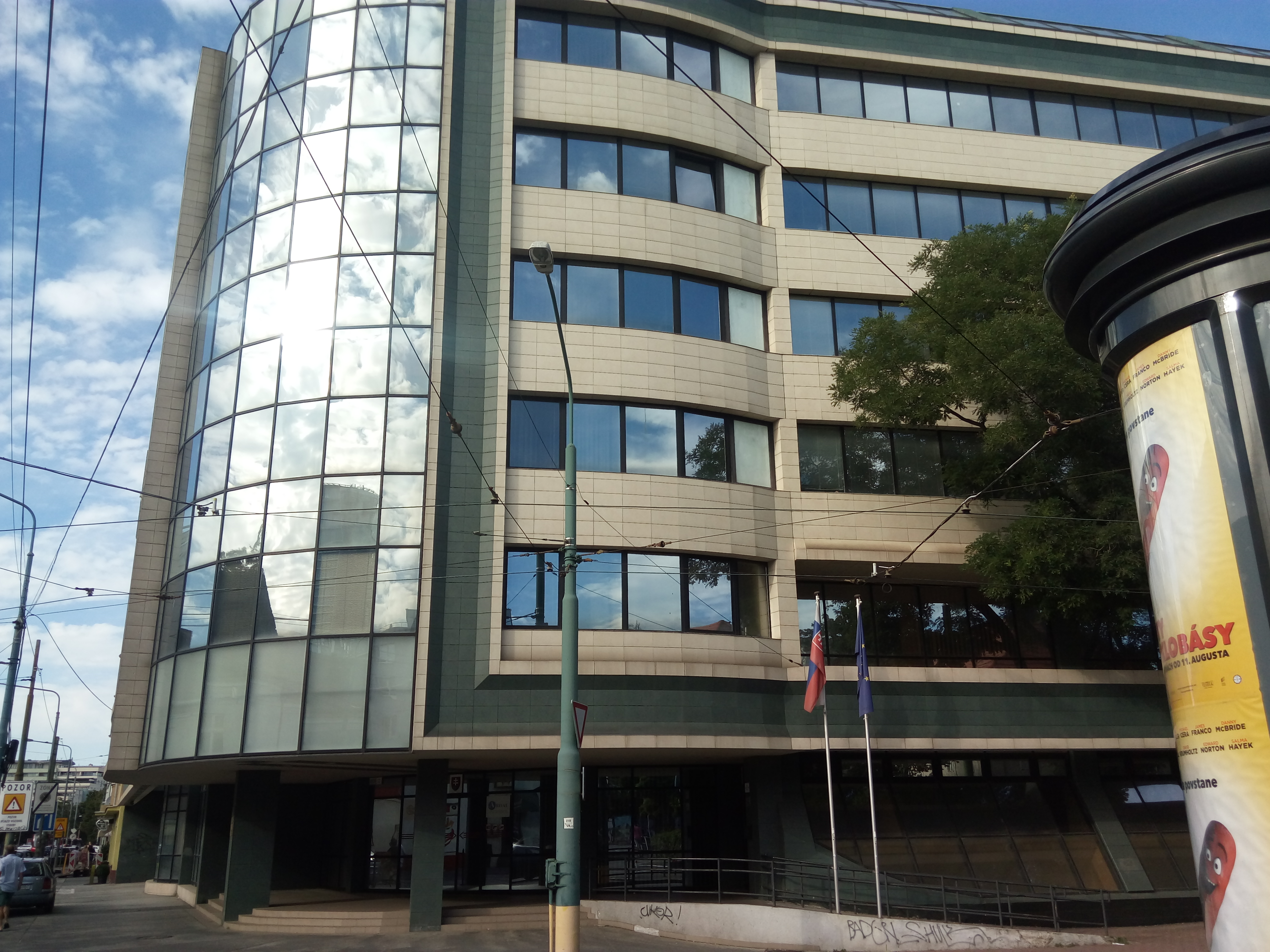 Radlinského 32, Staré Mesto, Bratislava